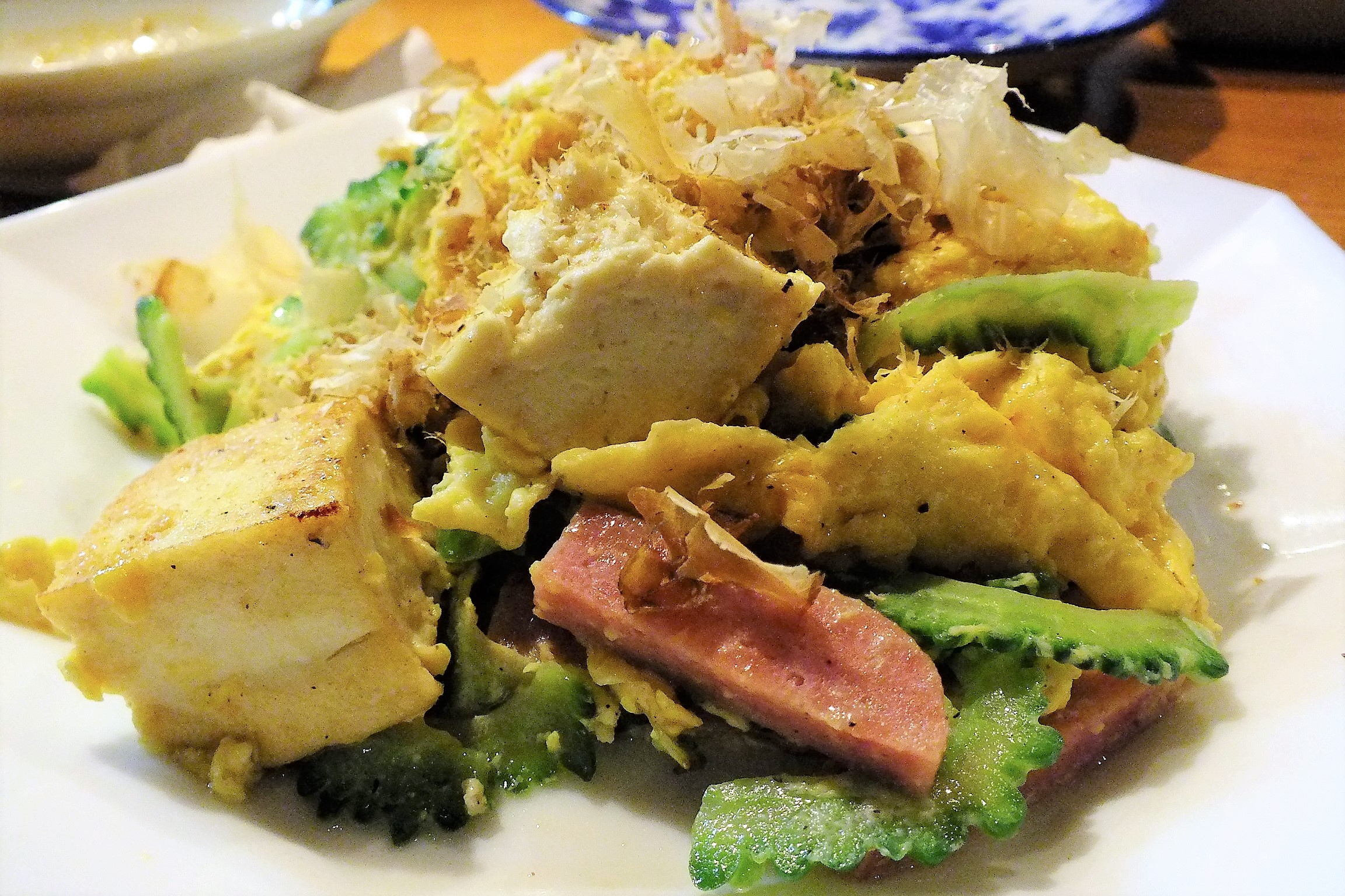 2015-12-16 Goya champru in Ishigakijima ゴーヤチャンプルー（石垣島）